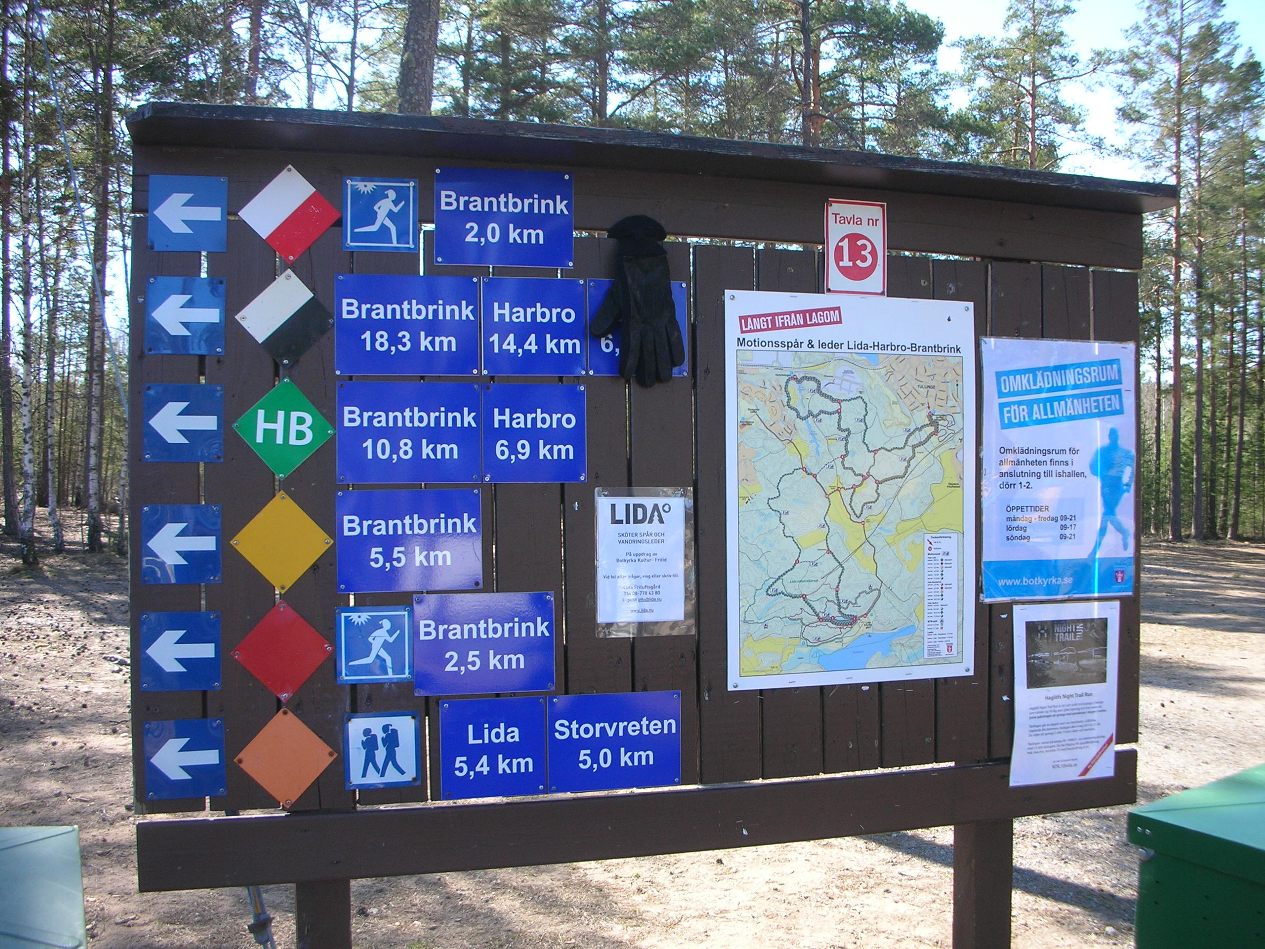 Spårtavla Brantbrink